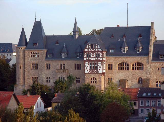 Schloss in Alzey Foto: E. Tinnacher (Benutzer:Serie1, eigenes Foto)